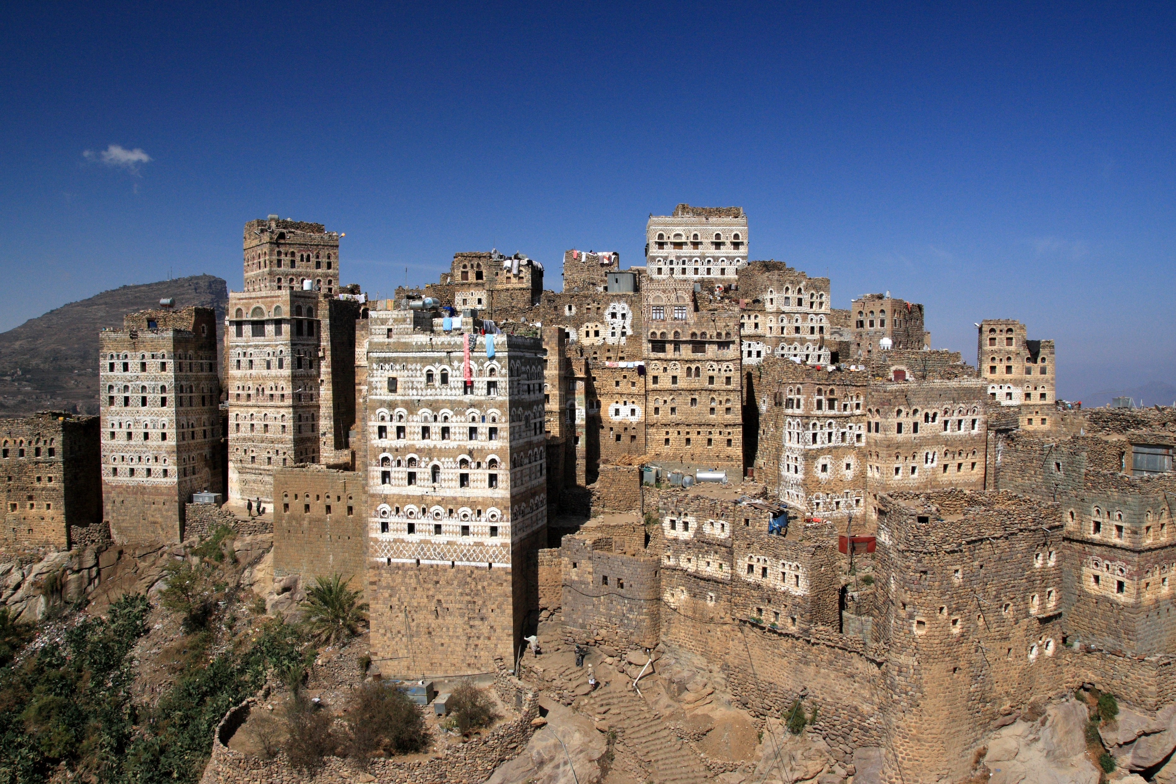 Al Hajjarah